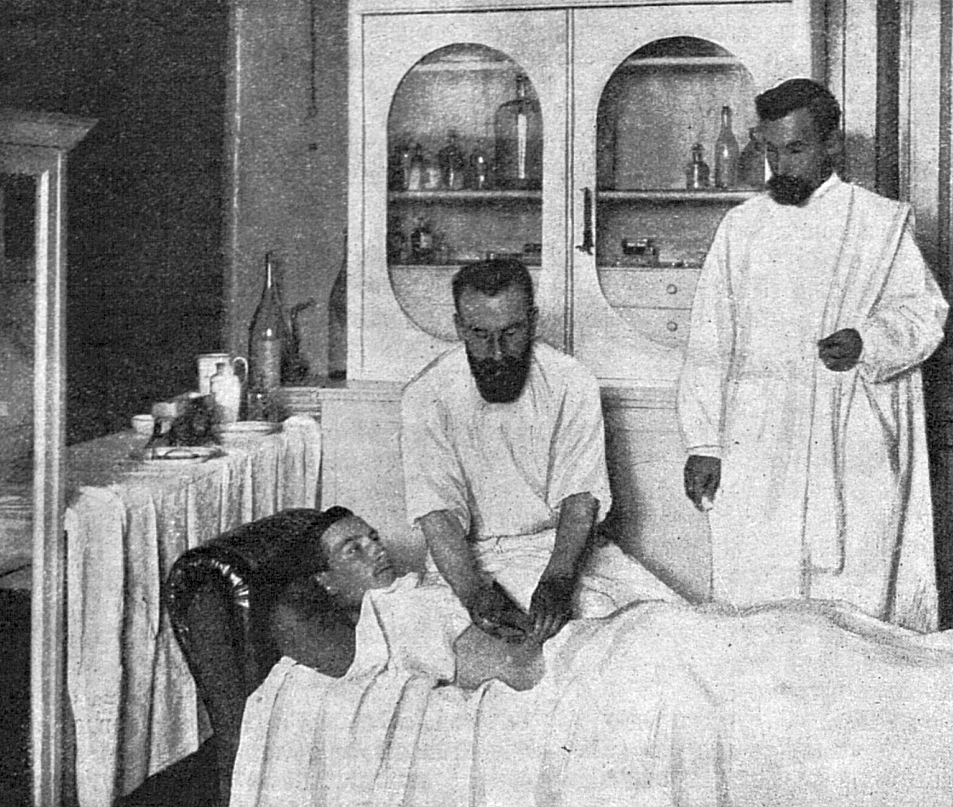 Первая противочумная прививка в Петербурге. На снимке изображён момент прививки доктором медицины В.М. Тылинским лимфы Хавкина молодому фельдшеру Александру Каткову. Золотоношенское изоляционное убежище, Санкт-Петербург, Российская империя. 1 сентября 1910 года